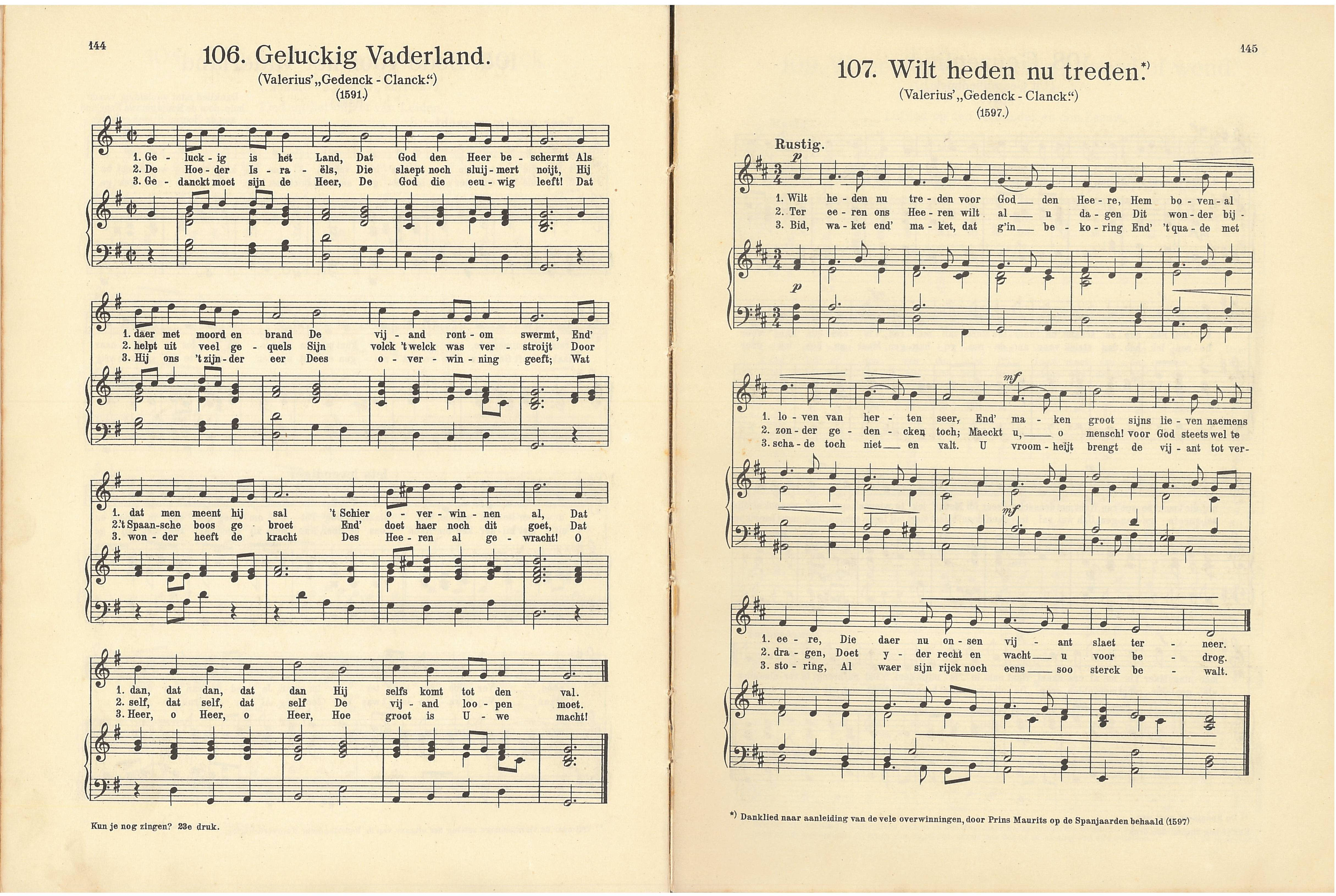 Kun je nog zingen, zing dan mee. Muziek en teksten origineel gepubliceerd voor 1900.